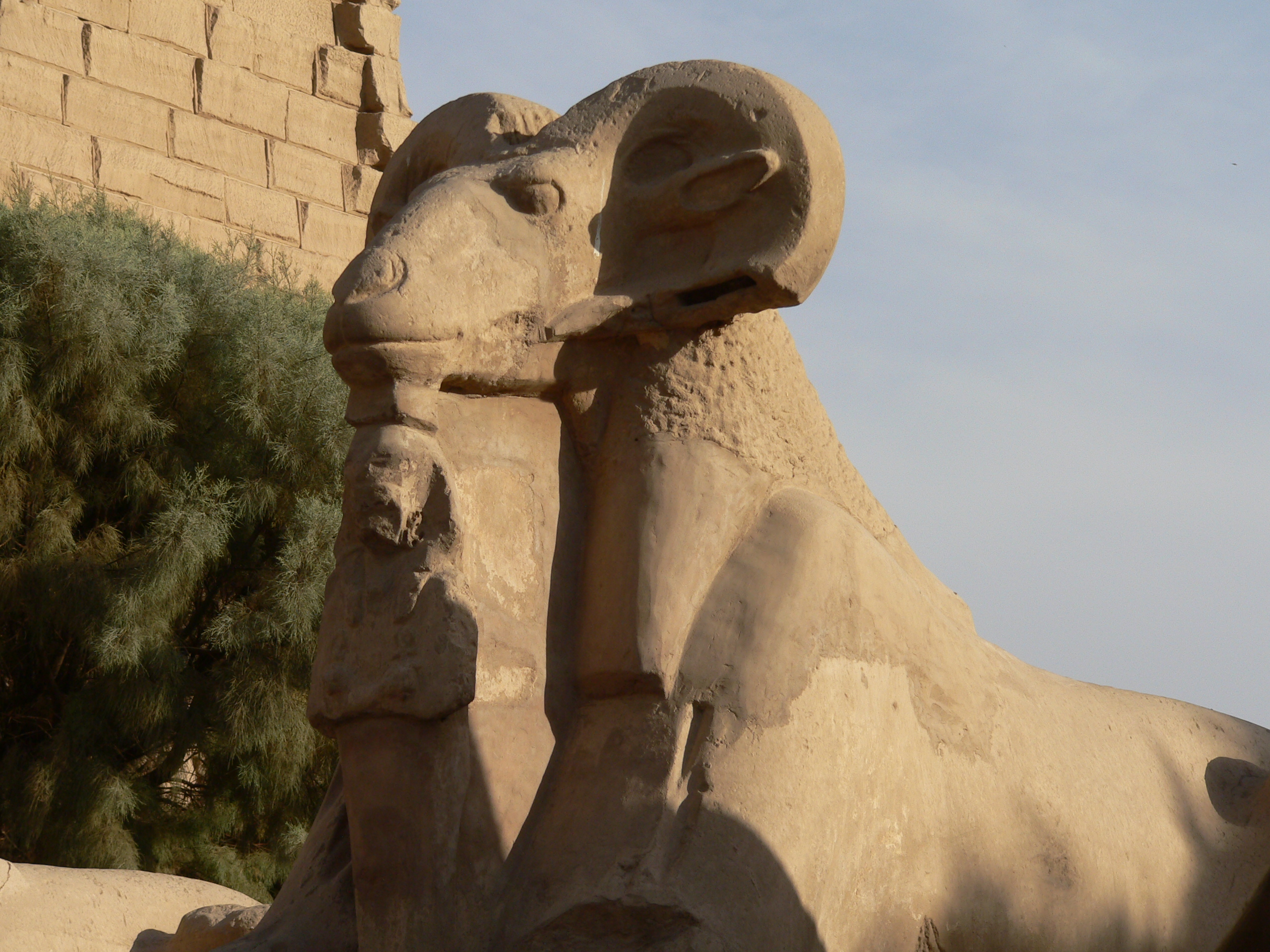 Cryosphynx at Karnak Temple